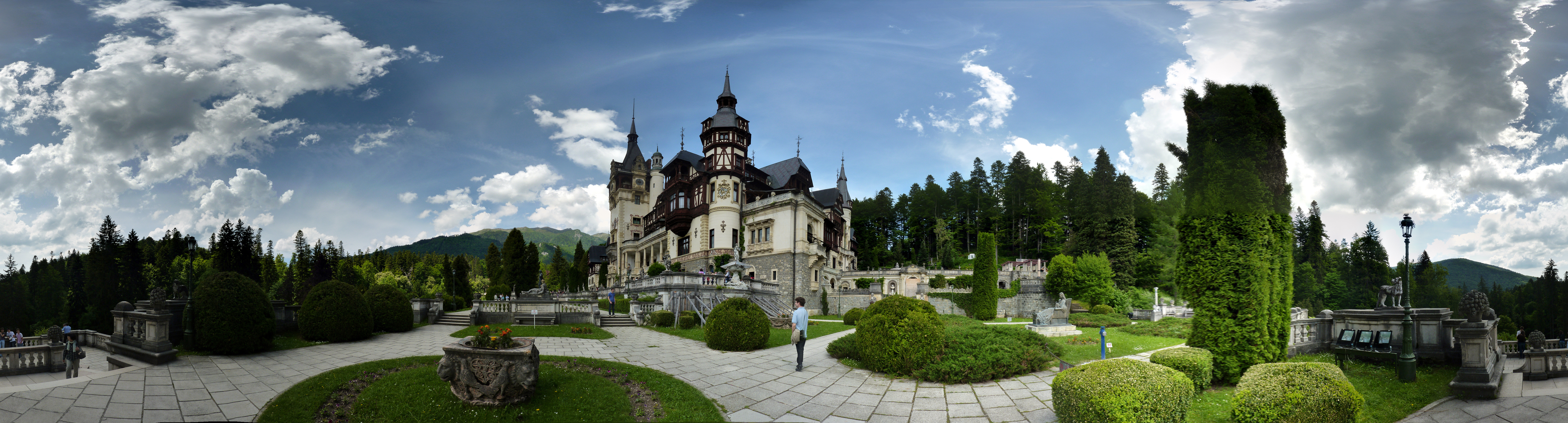 Peleș Castle